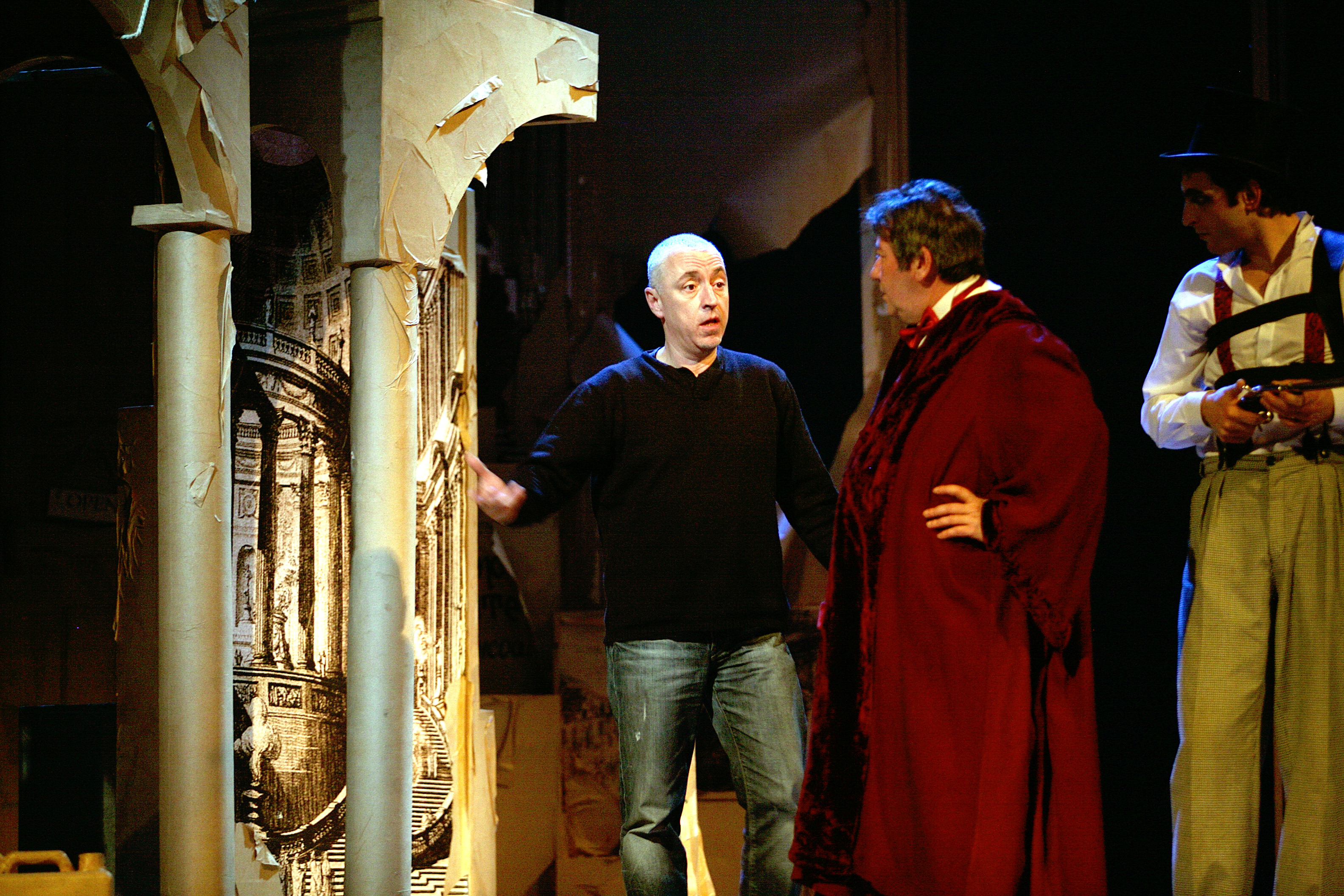 חזרות על "משרתם של שני אדונים" תיאטרון הלאומי בולגריה-צלם אטנאס קאנצ'ב 2009 (Atanas Kanchev)